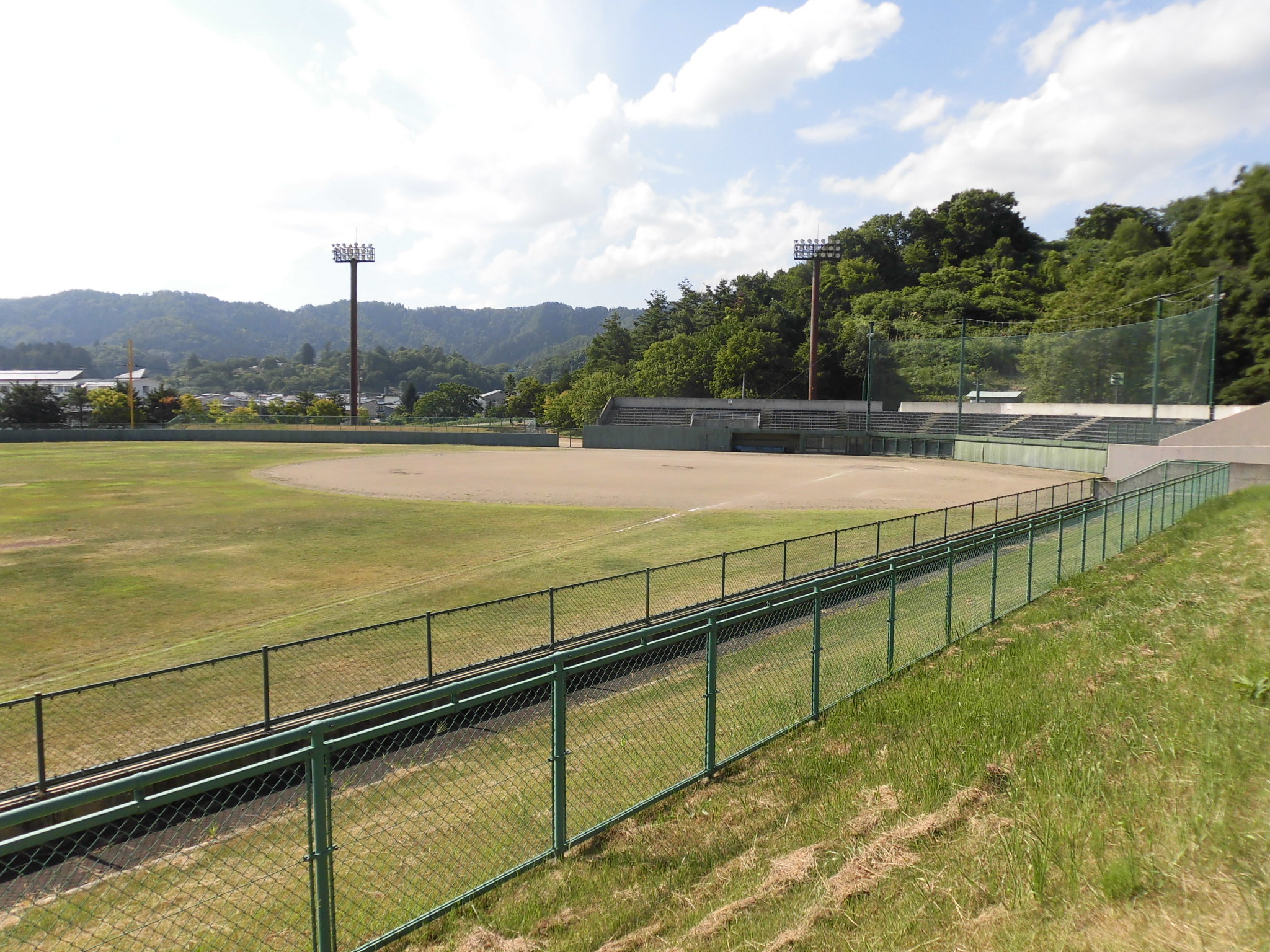 向山公園野球場、バックネット側。山形県南陽市宮内に所在。